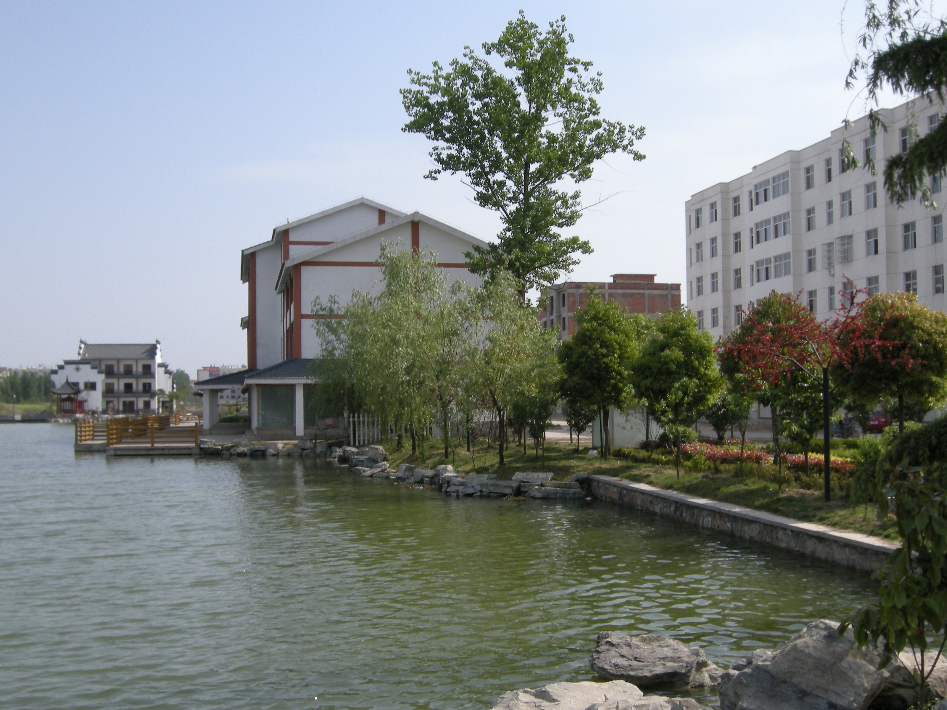 固始县古城公园一角